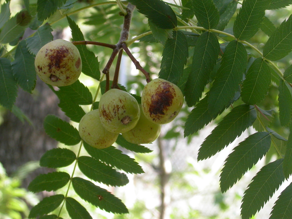 Fruit et feuilles de cormier (sorbus domestica)